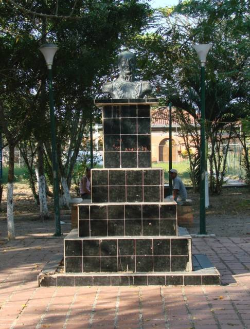 Manzanita-PlazaBolivar